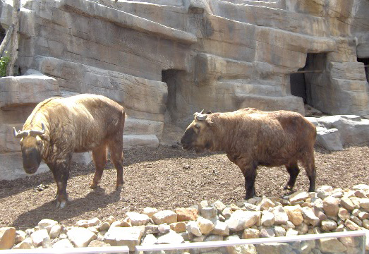 Species Budorcas taxicolor Family Bovidae